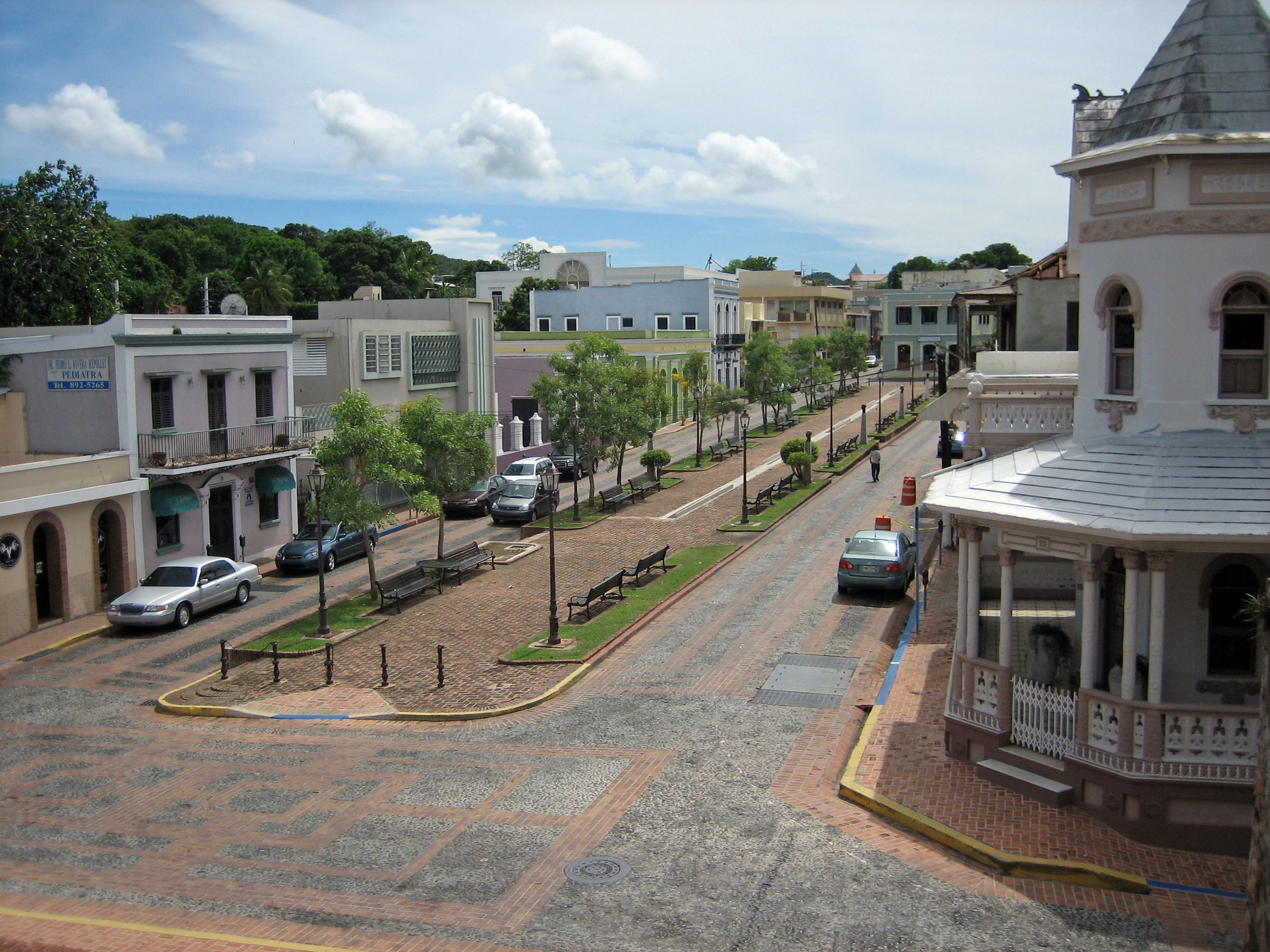 Plaza Santo Domingo, San Germán Historic District, Puerto Rico